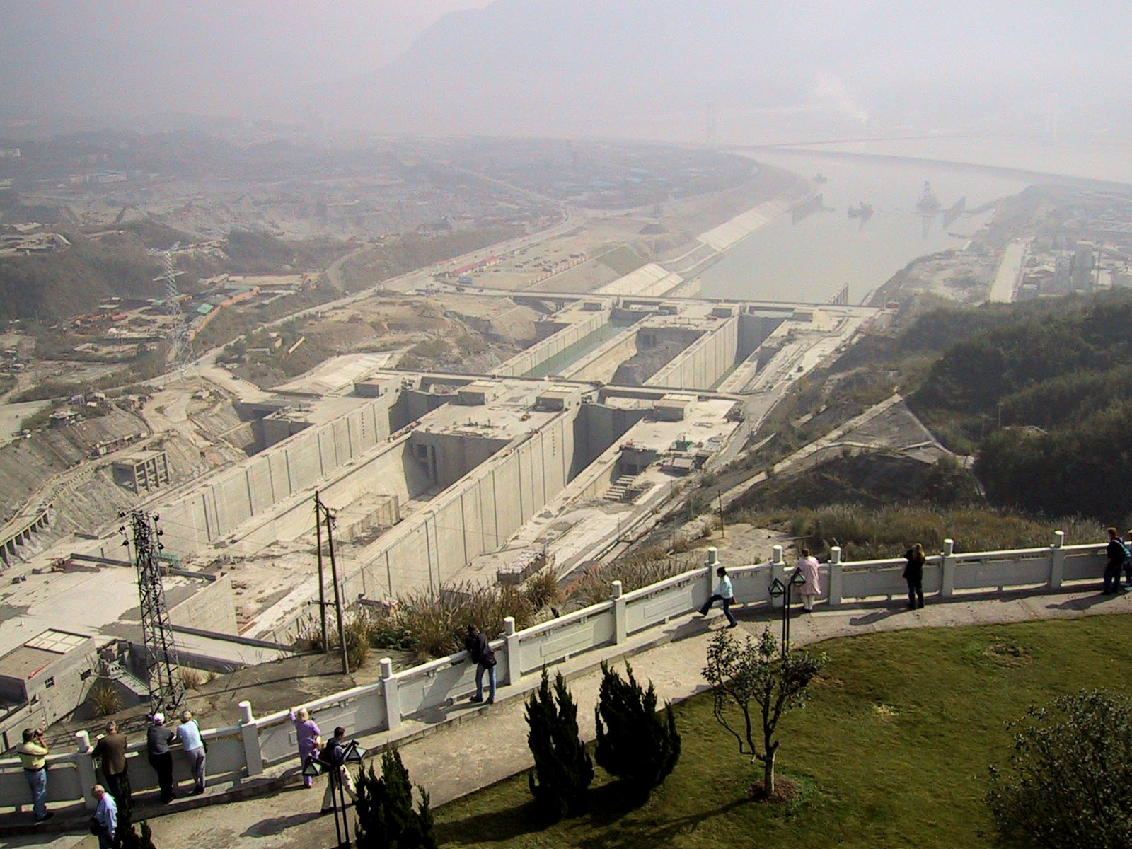 Schiffsschleusen am Dreischluchtendamm (Jangtsekiang) - Bauphase 2002 Aufnahme vom 9.11.2002. Fotograf Frank Matthes (selbst fotografiert). Lizenzstatus "GNU-FDL" 23:29, 19. Okt 2004 Yogho 1600 x 1200 (365966 Byte) (Schiffsschleusen am Dreischluchtendamm (Jangtsekiang) - Bauphase 2002)